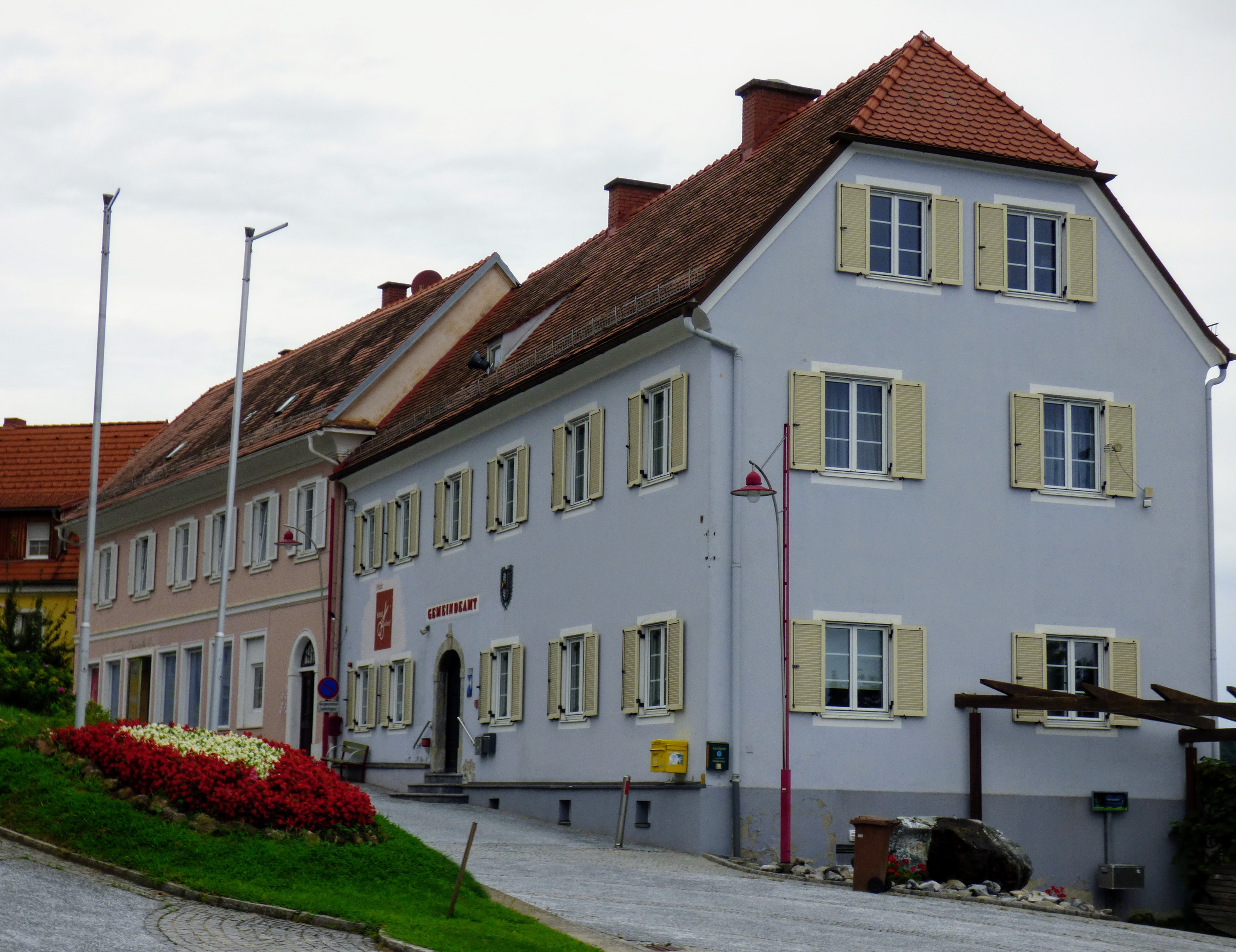 Trautmannsdorf (heute Teil der Gemeinde Bad Gleichenberg), ehemaliges Gemeindeamt